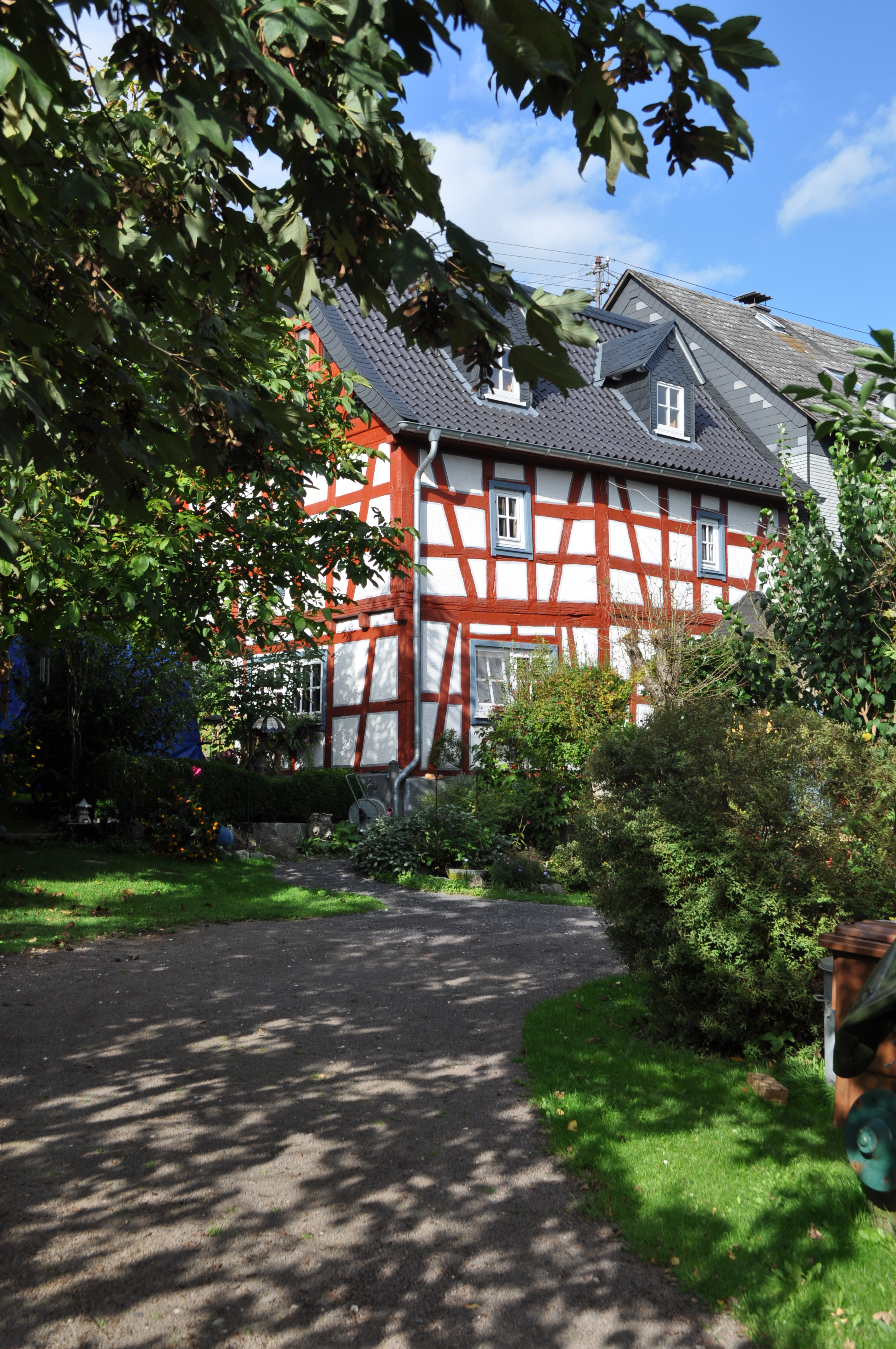 Ellingen, Oberstraße 16